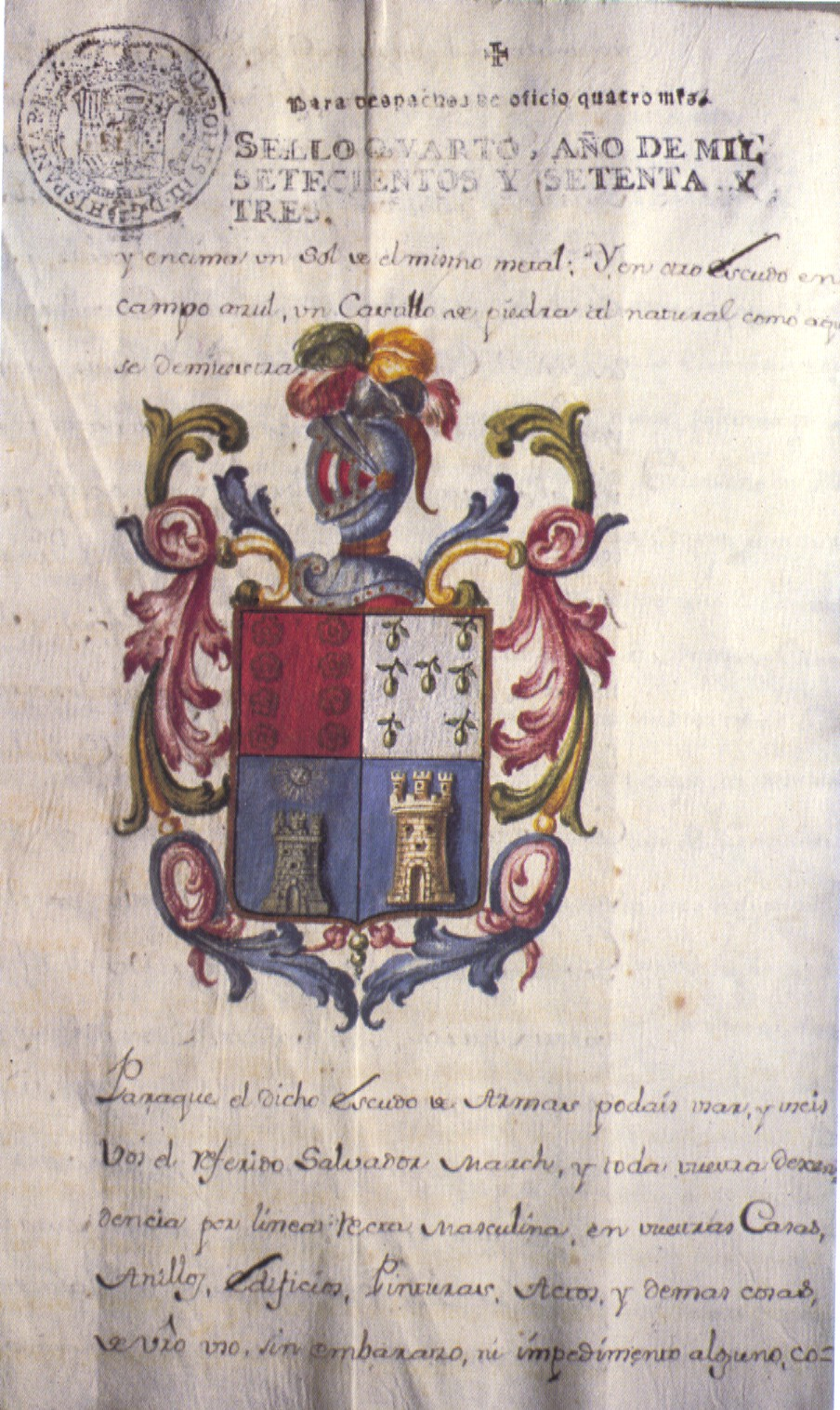 Escut d'armes de Salvador March Bellver, obtingut en temps del rei Carles III. (Arranz / Fuguet, 1987, p. 39).